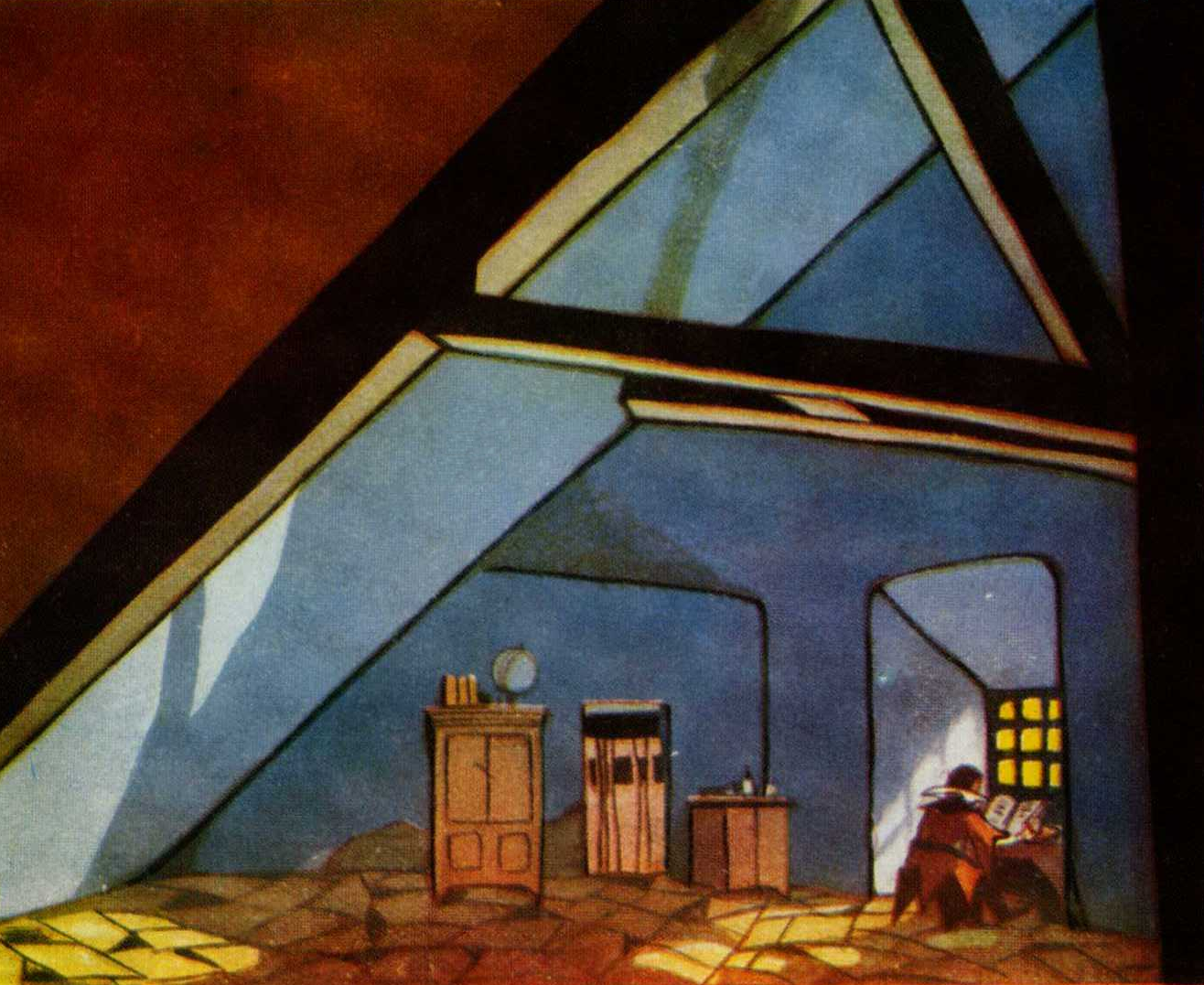 La poussière de Soleils tableau 18